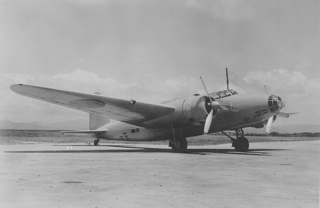 浜松基地での97式重爆